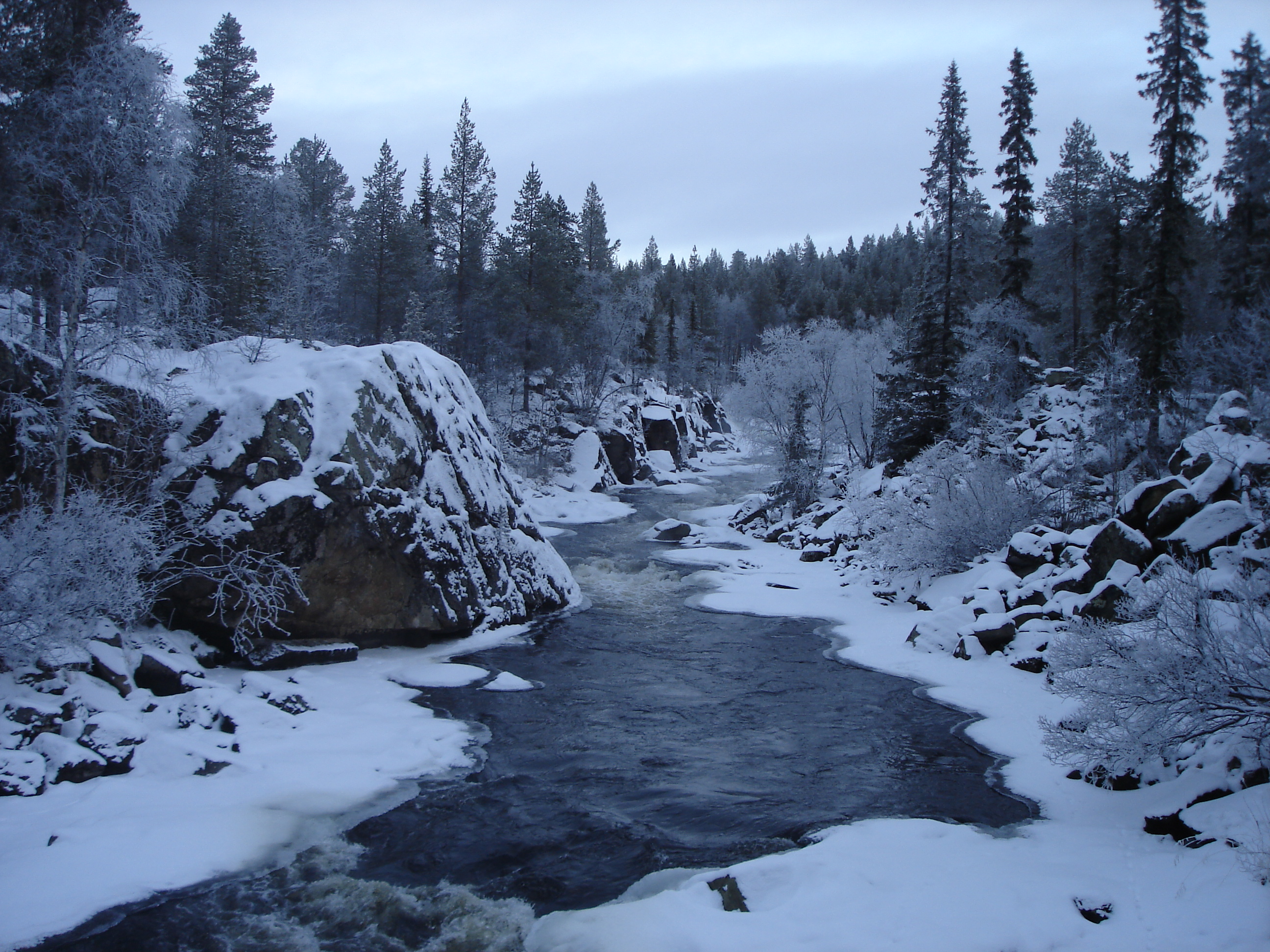 Река Печа (бассейн Имандры)